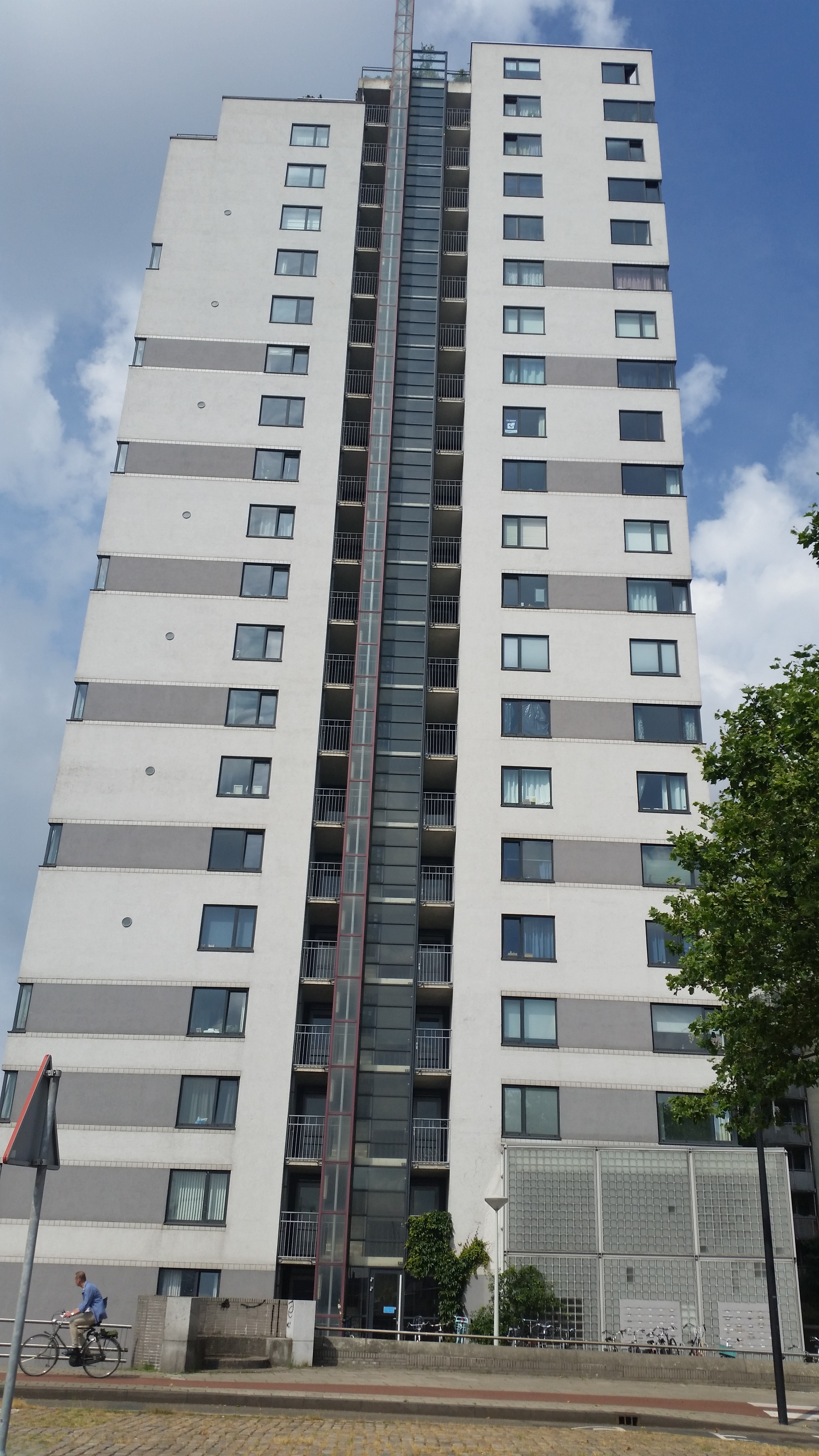 Watertoren (omdat ze in het water staat) aan de C. van Eesterenlaan, Amsterdam